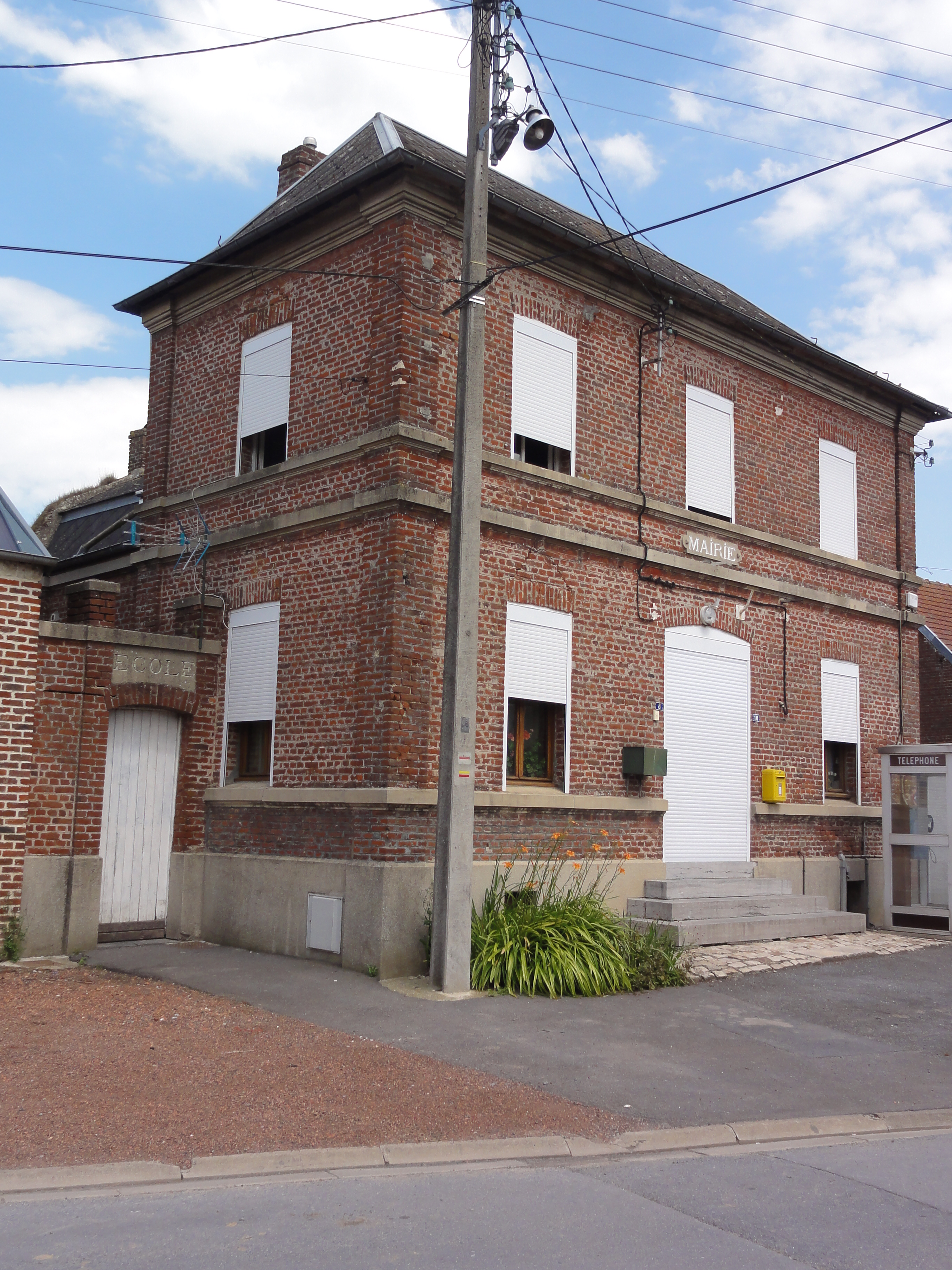 Montrécourt (Nord, Fr) école, ancienne mairie